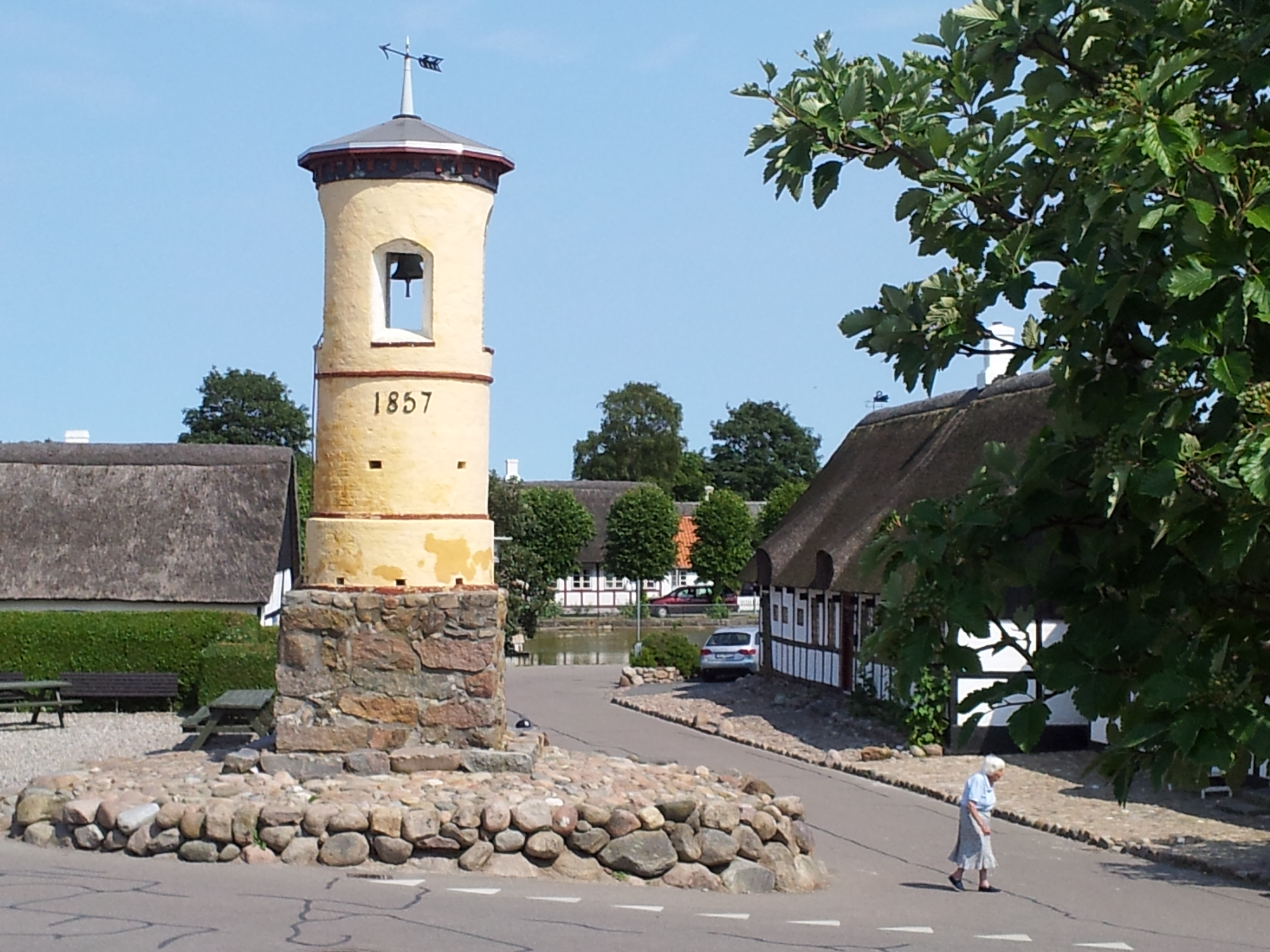 Nordby, Samsø